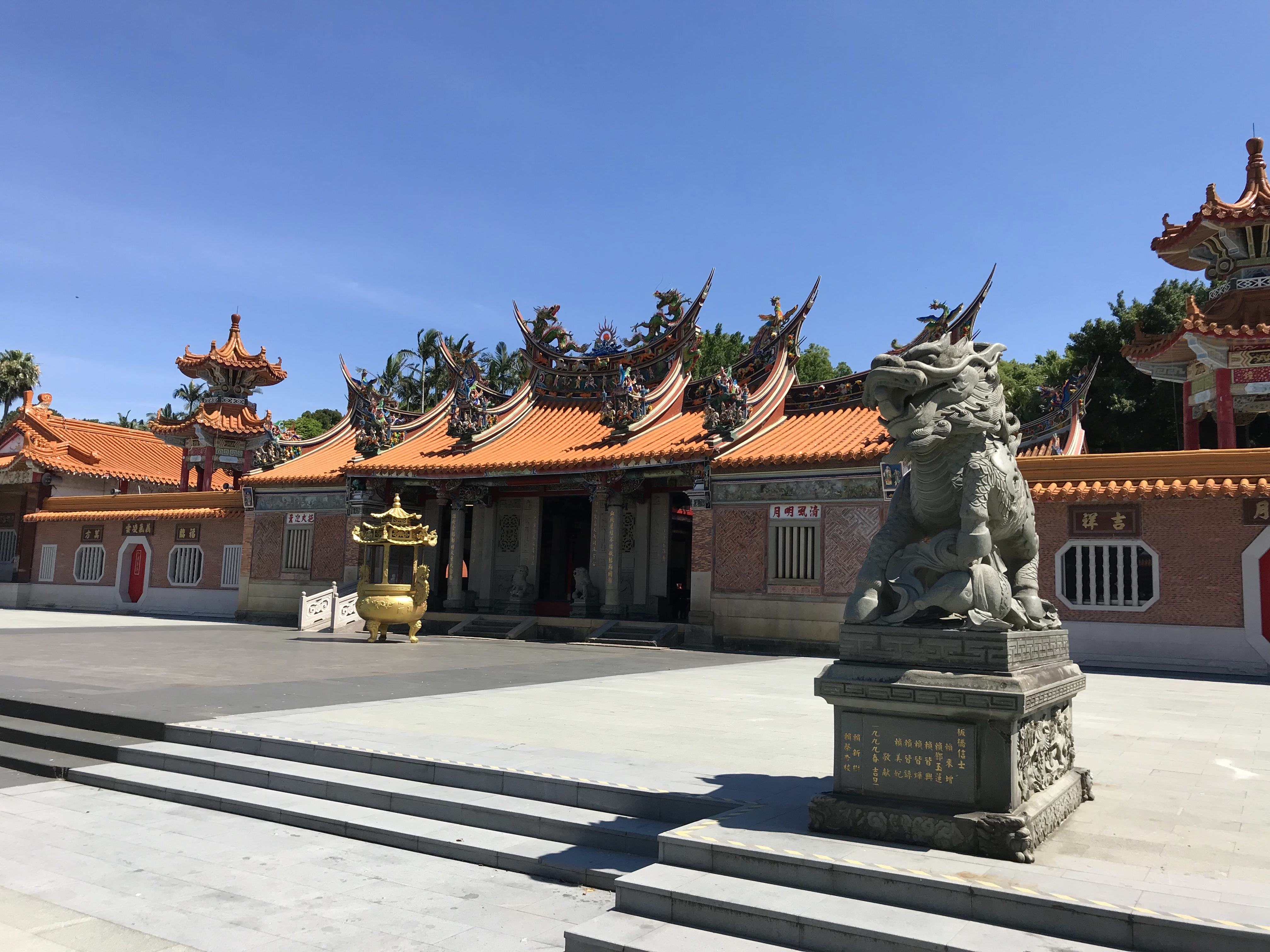 褒忠亭義民廟斜照